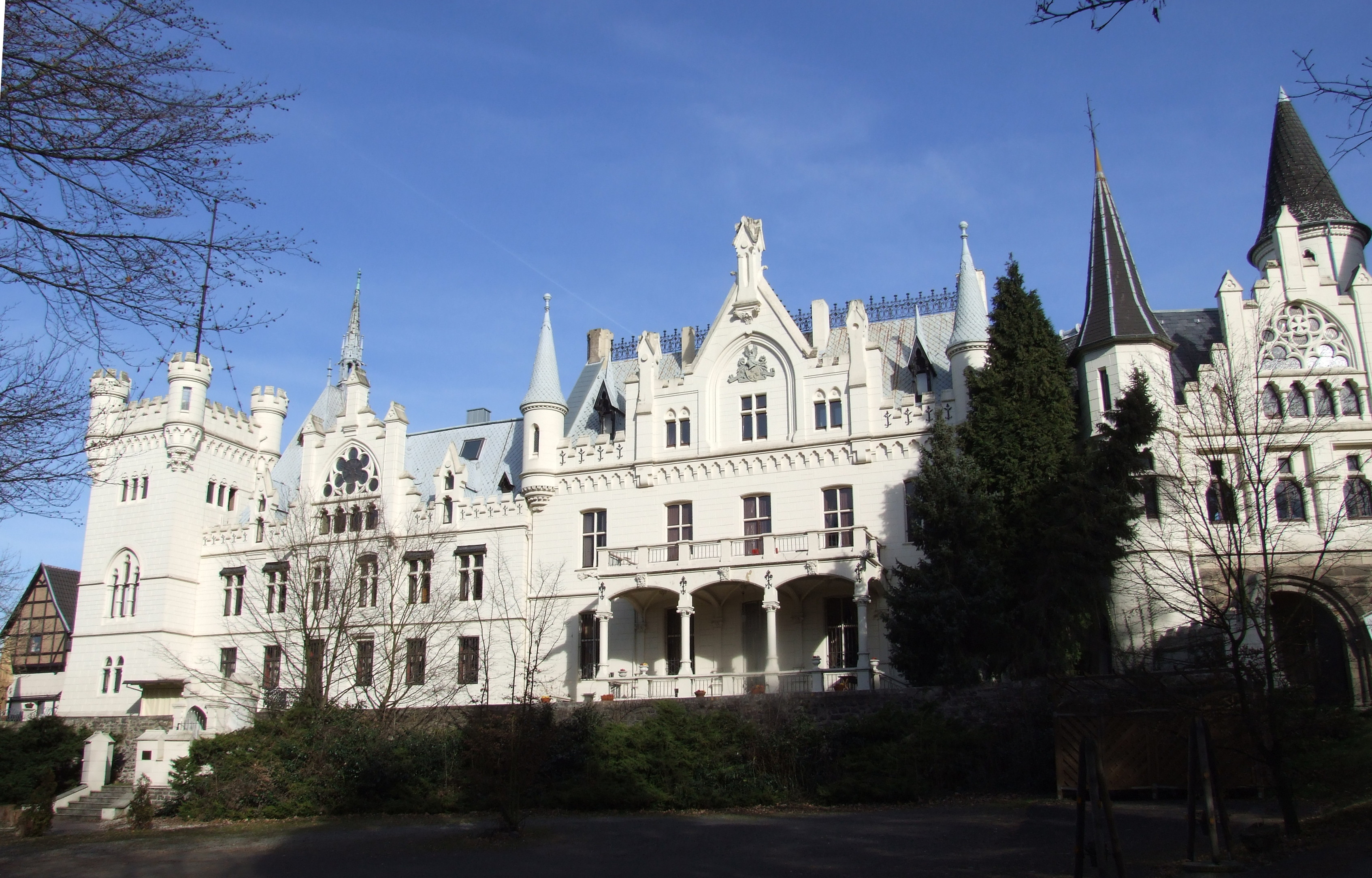 Deutschorden-Kommende Ramersdorf (Bonn) This is a photograph of an architectural monument. 773